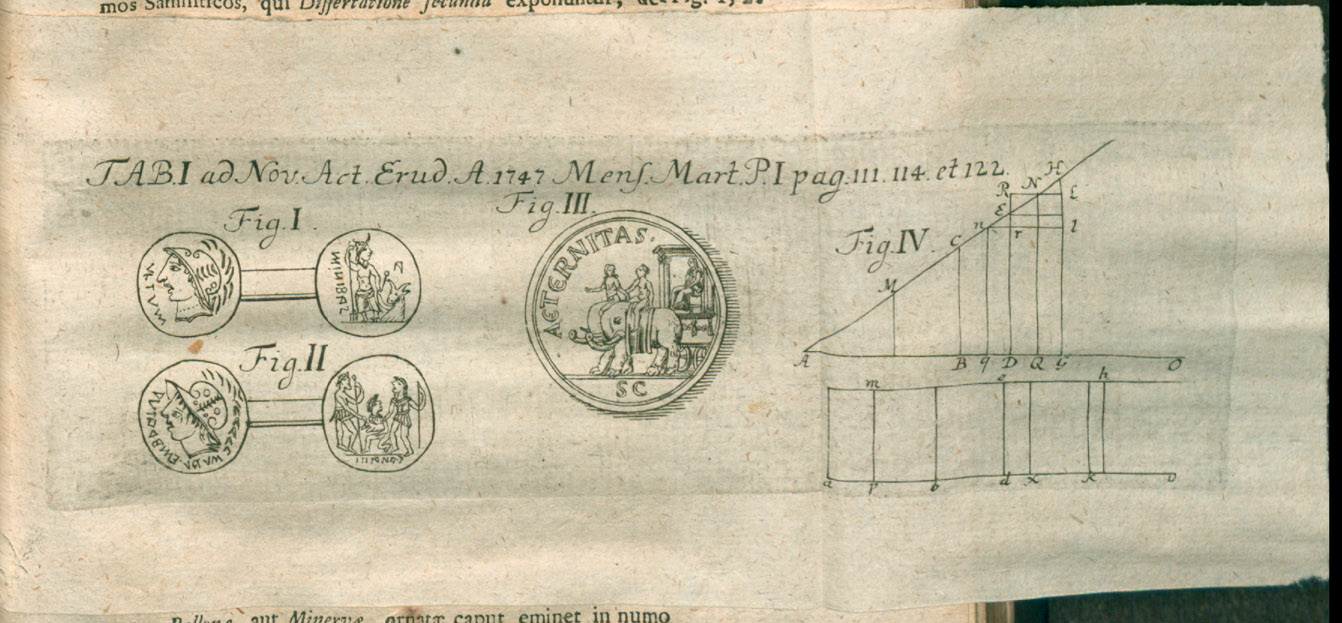 Illustration